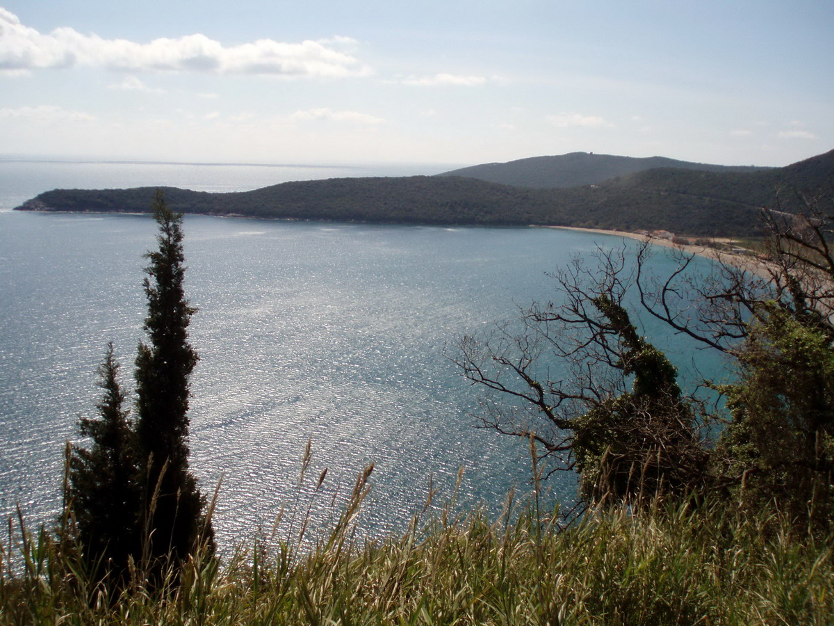 Jaz Beach, near Budva.